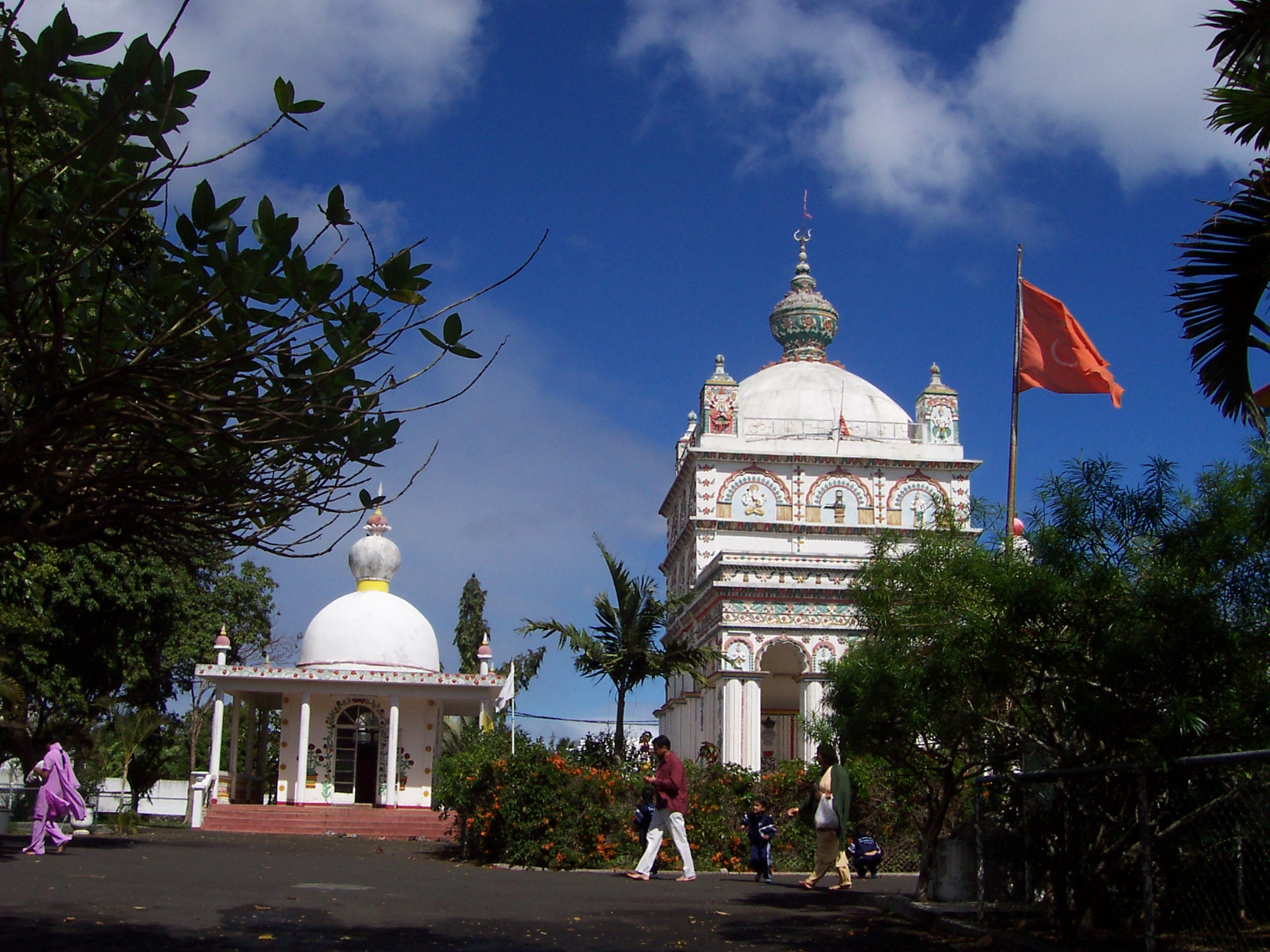 temple vers trou aux biches